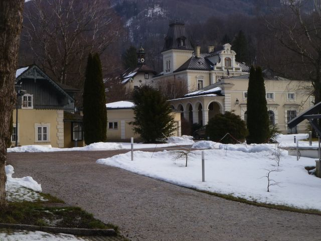 Villenanlage, Villa Schmederer